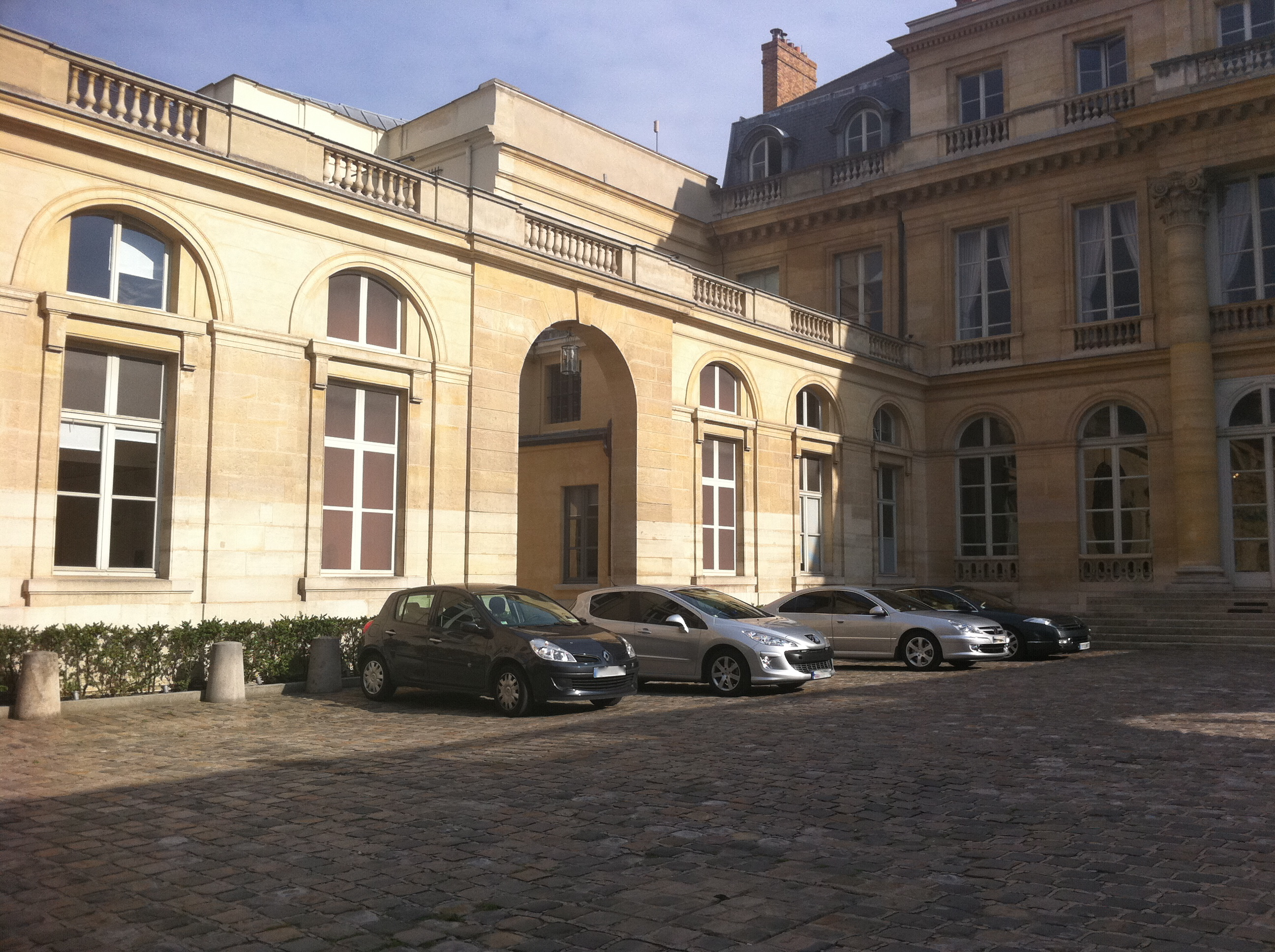 Aile Est de l'hôtel du Châtelet (Paris).